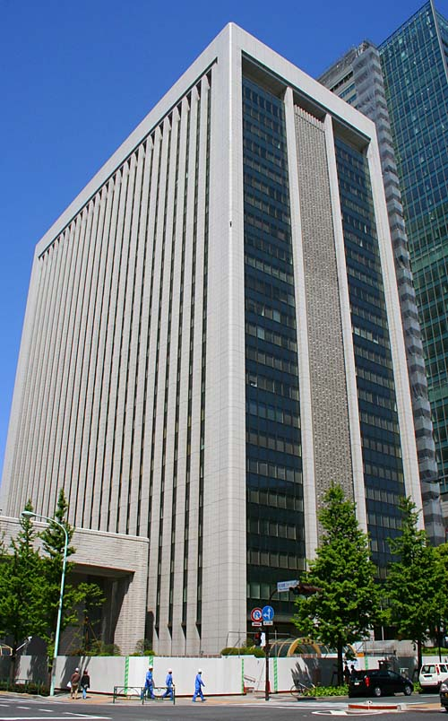 三菱東京UFJ銀行本店（旧三菱銀行本店）